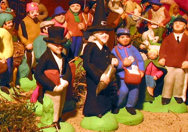 Santons 11cm